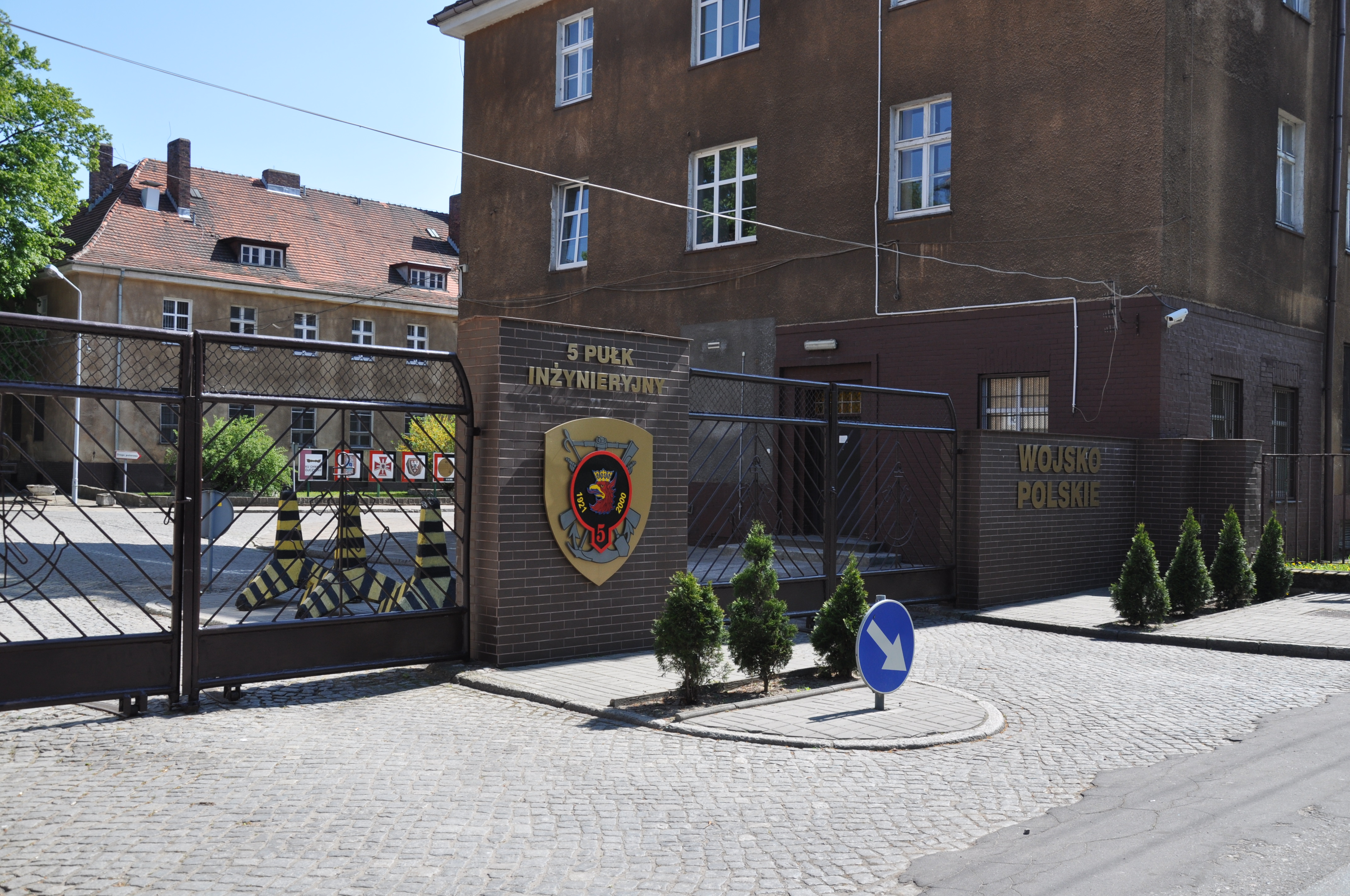 koszary 5 pinż w Szczecinie